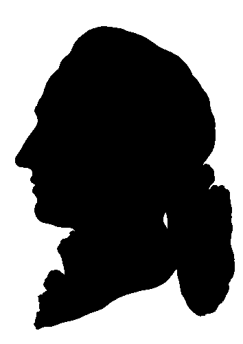 Titel: Schattenriss Goethes (Original text: Schattenriss Goethes (um 1775 oder wenig später entstanden). Das Original aus schwarz hinterlegtem weißen Papier wird in der Stiftung Weimarer Klassik aufbewahrt.)